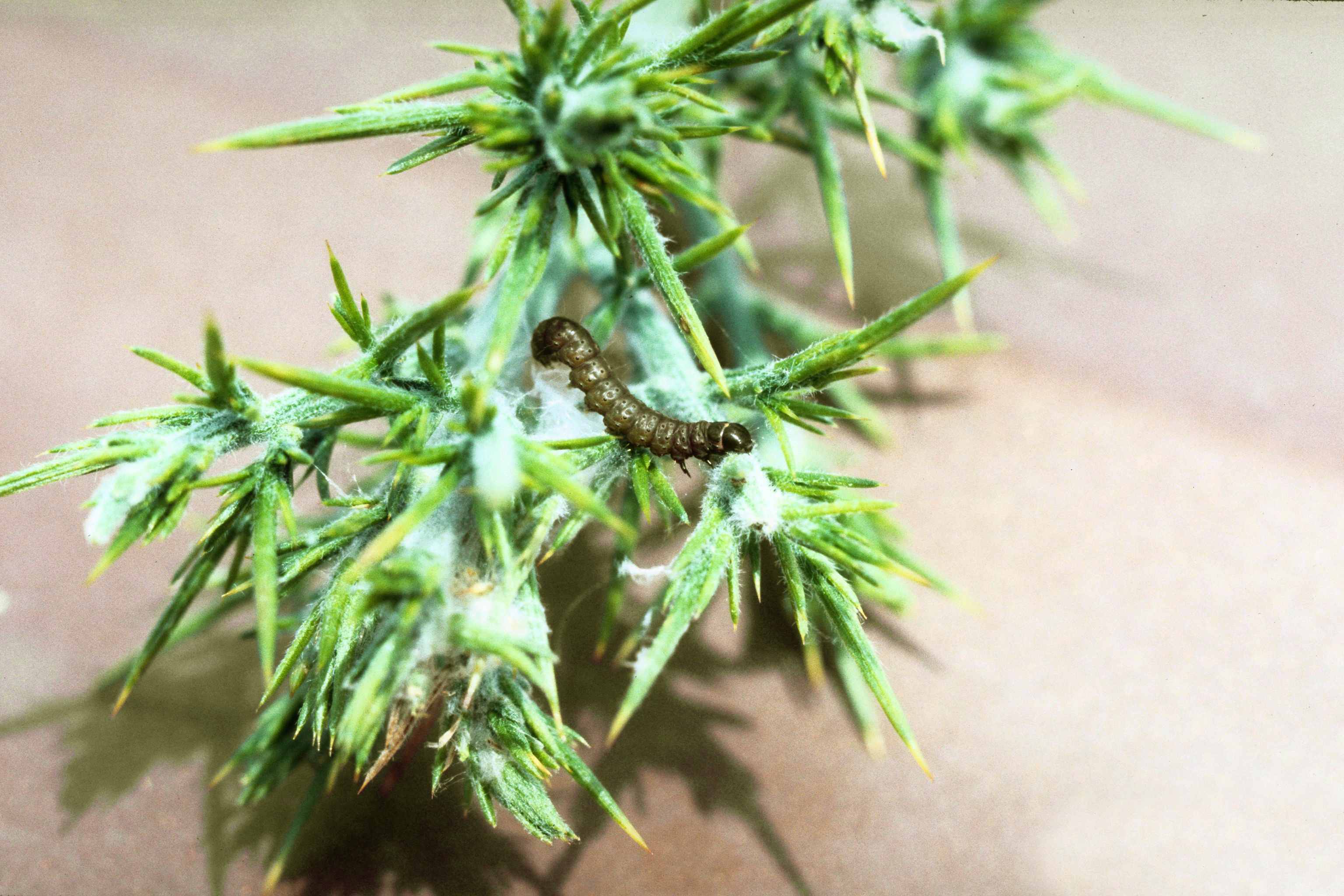 Agonopterix ulicitella feeding on gorse (Ulex europaeus)